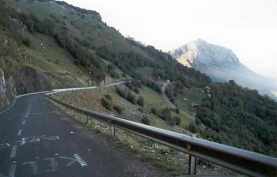 cuesta que recibe el nombre de Cueña Les Cabres con un desnivel del 23%